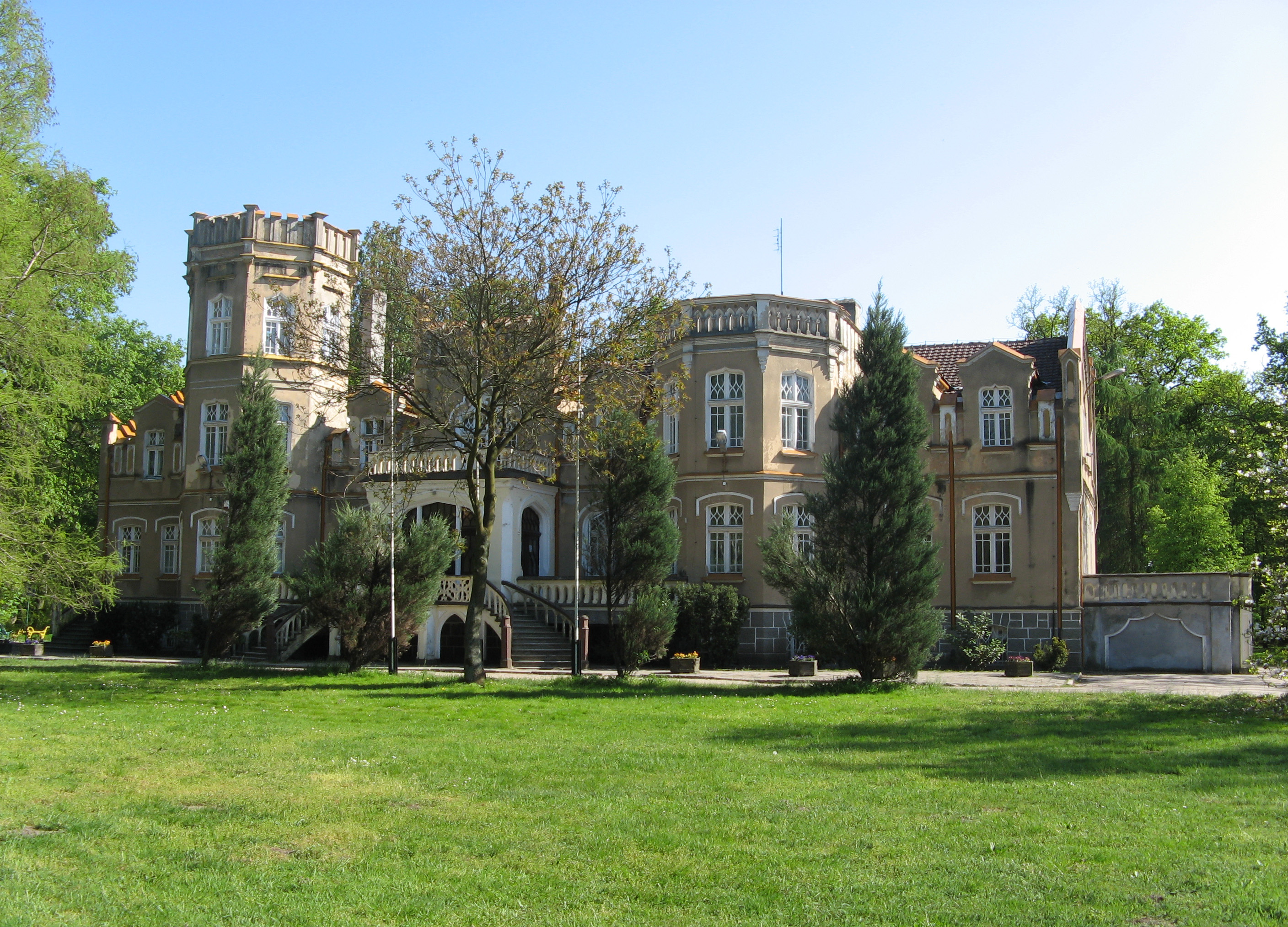 Elewacja frontowa pałacu w Kotowie (zabytek nr rejestr. 1418/A)